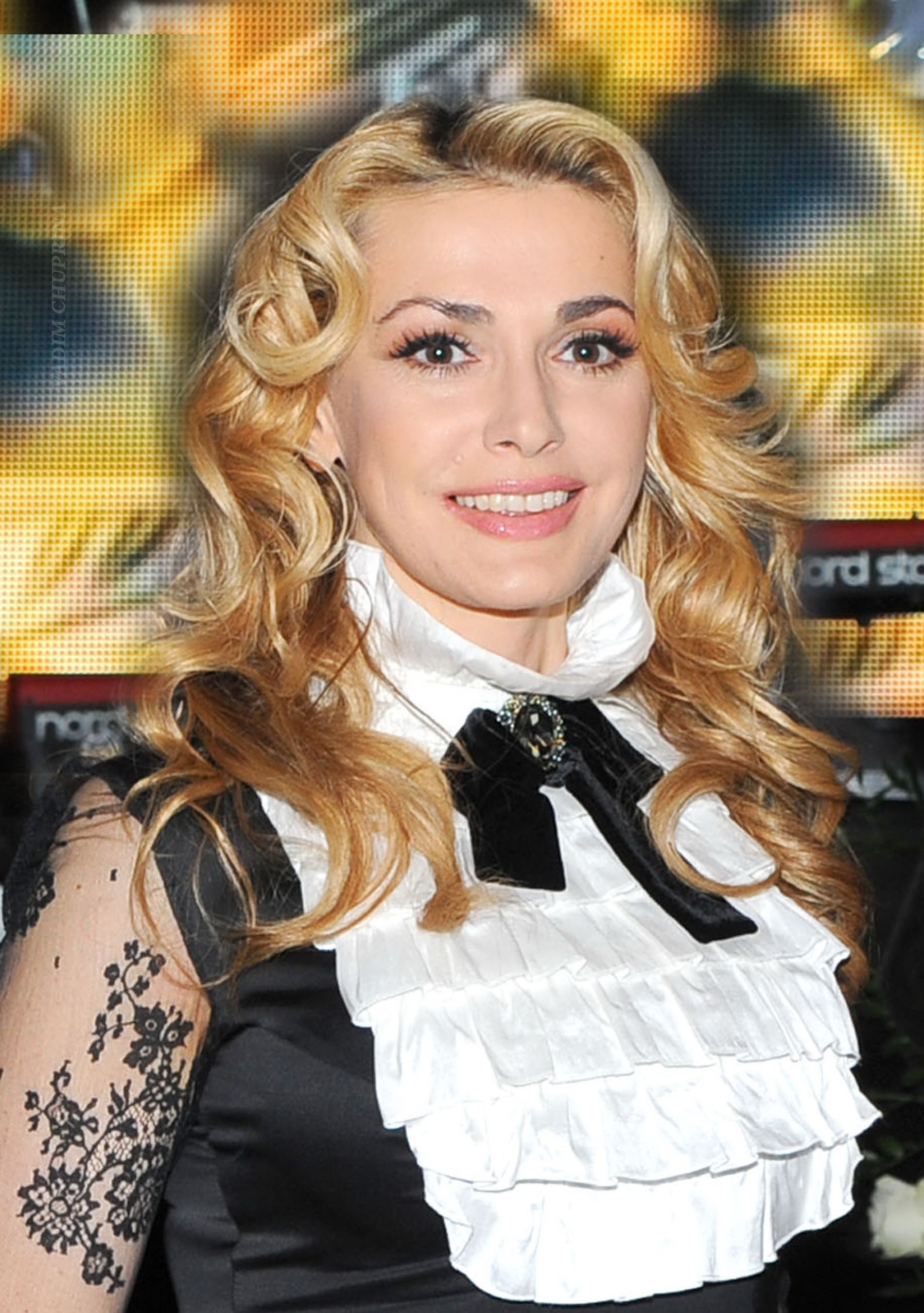 Сумская, Ольга Вячеславовна, фото Чуприна Вадим